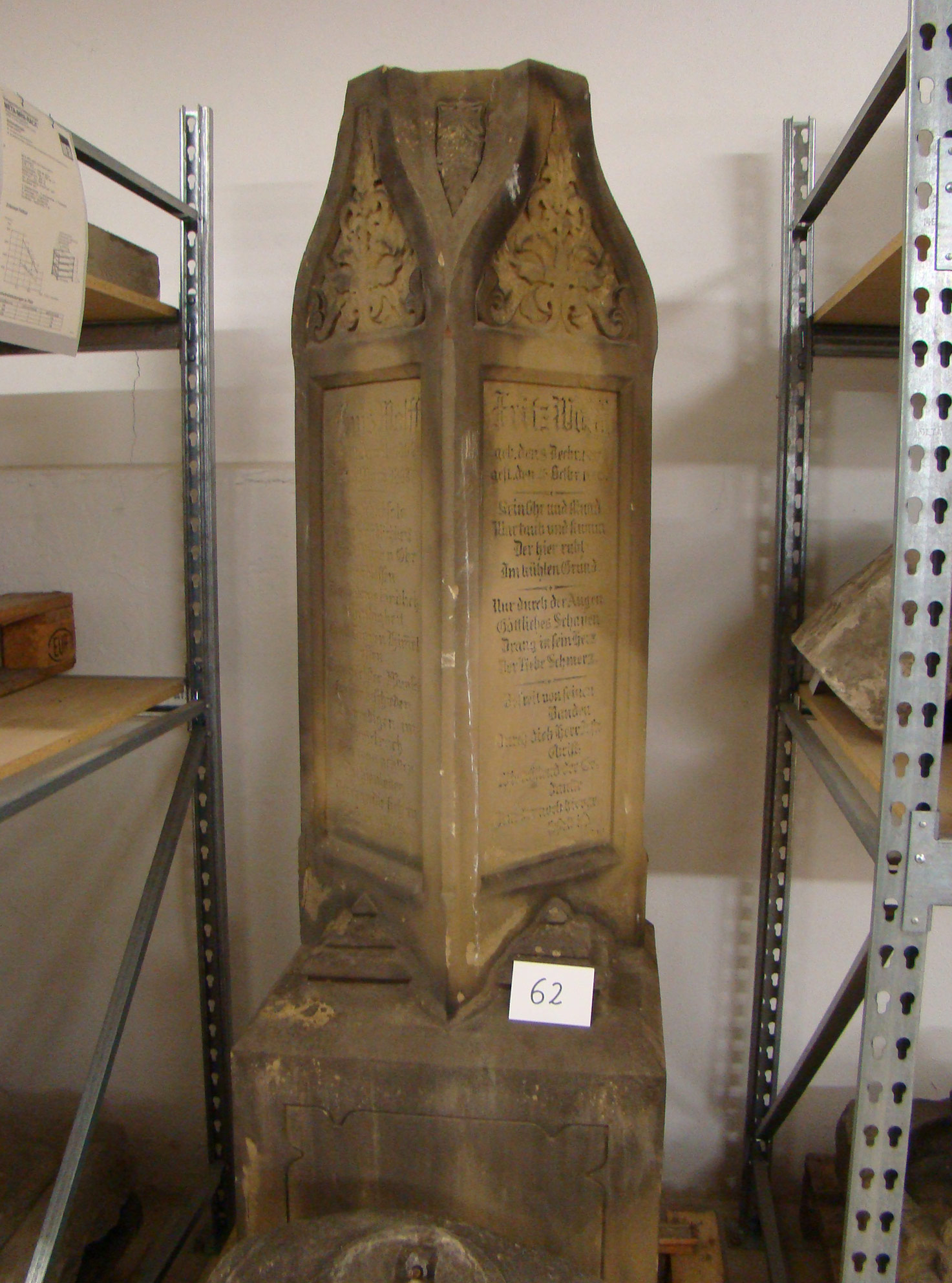 Grabstein des Lithographen-Brüderpaares Wolff, ehem. im Alten Friedhof, Foto von 2012 im Lapidarium in Heilbronn, seit 2013 Teil der Ausstellung im Haus der Stadtgeschichte Heilbronn